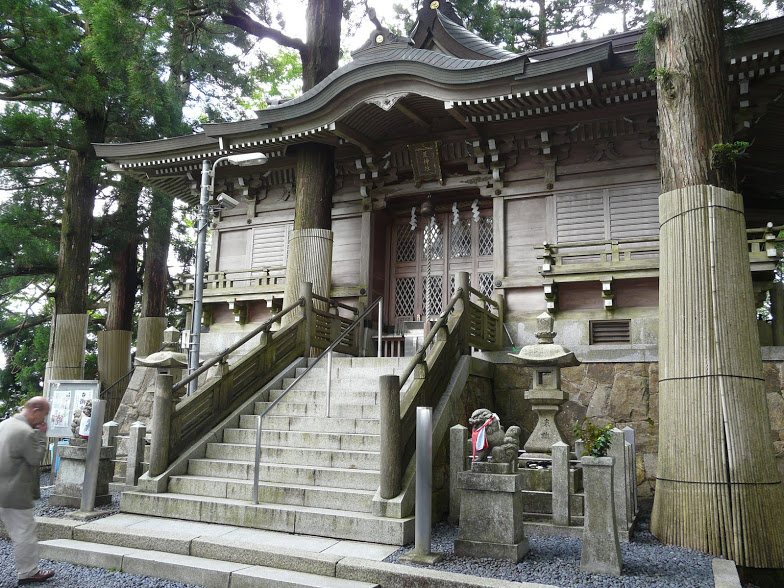 荒神社拝殿